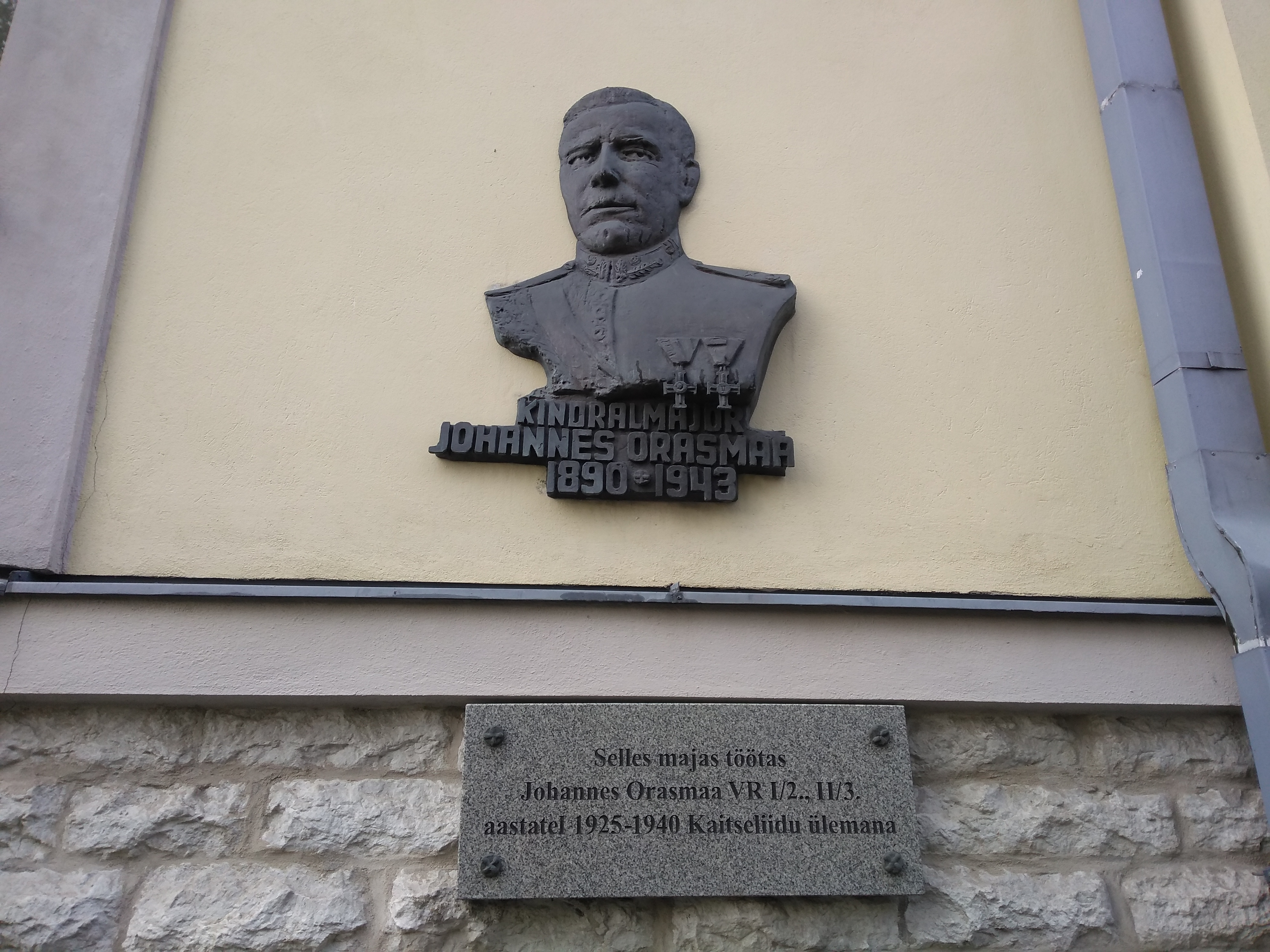 Tallinnas Kaitseliidu Peastaabi hoonel olev kindralmajor Johannes Orasmaa bareljeef